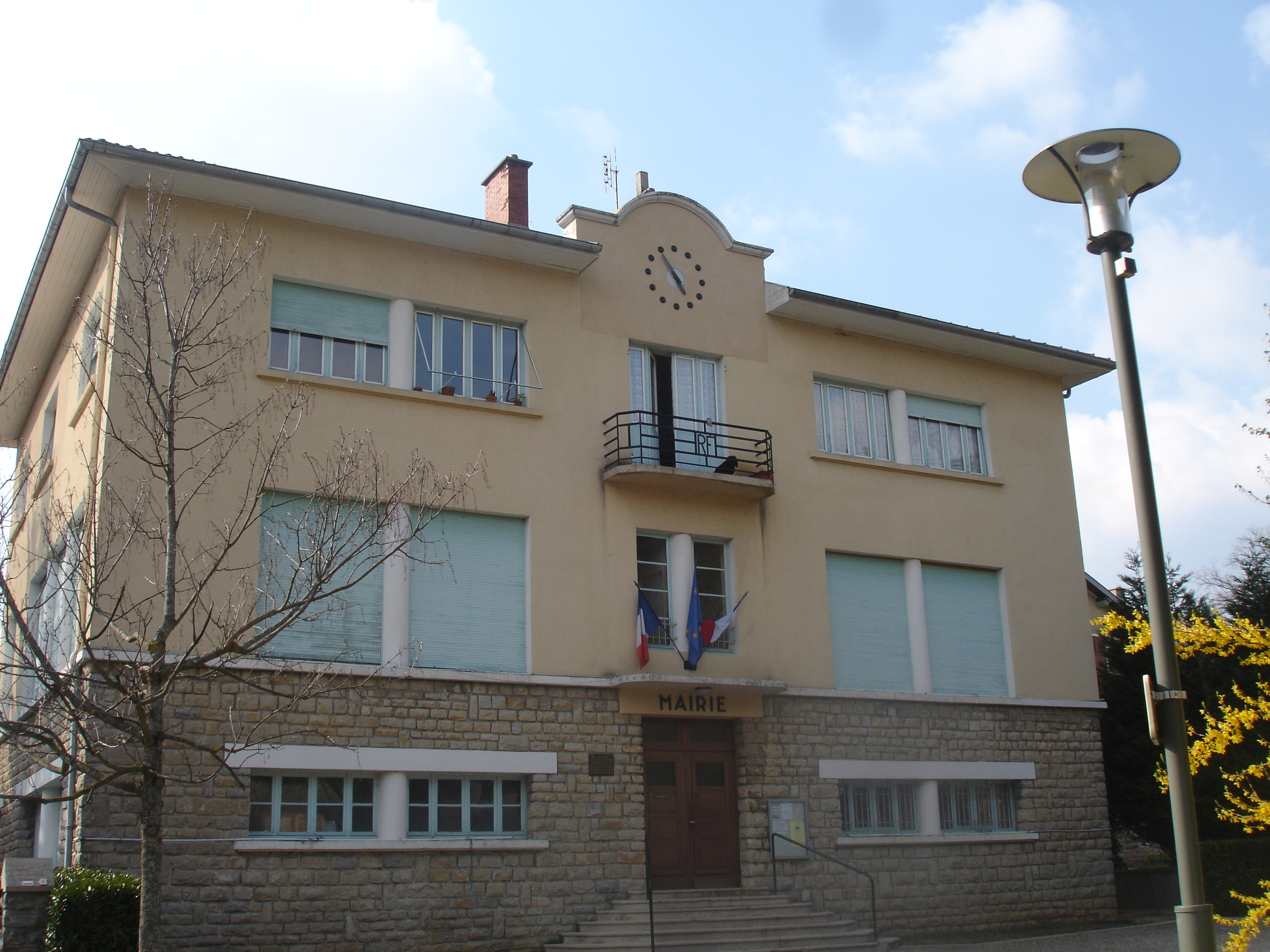 Pressiat (Ain) : la mairie